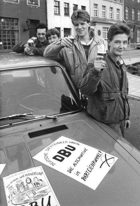 ADN-ZB Sindermann 15.3.90 wü Rostock: DBU kandidiert. Für staatlich subventionierte Bierpreise, die Einhaltung des deutschen Reinheitsgebots beim Brauen und die 0,6-Promille-Grenze im Strassenverkehr sowie gegen Drogen, Alkoholmißbrauch und ausländisches Dünnbier will die "Deutsche Biertrinker Union" (DBU) im Küstenbezirk antreten. Die angestrebte Koalition der bereits 100 Mitlieder zählenden Partei mit der "Deutschen Sexliga" kam leider nicht zustande. Schatzmeister Steffen Hackmann, Geschäftsführer Andeas Häse, stellv. Geschäftsführer Jan Hackmann und Vorstandsmitglied Rüdiger Fuhrmann (v.l.) vor der Hafenkneipe "Zur Kogge"."